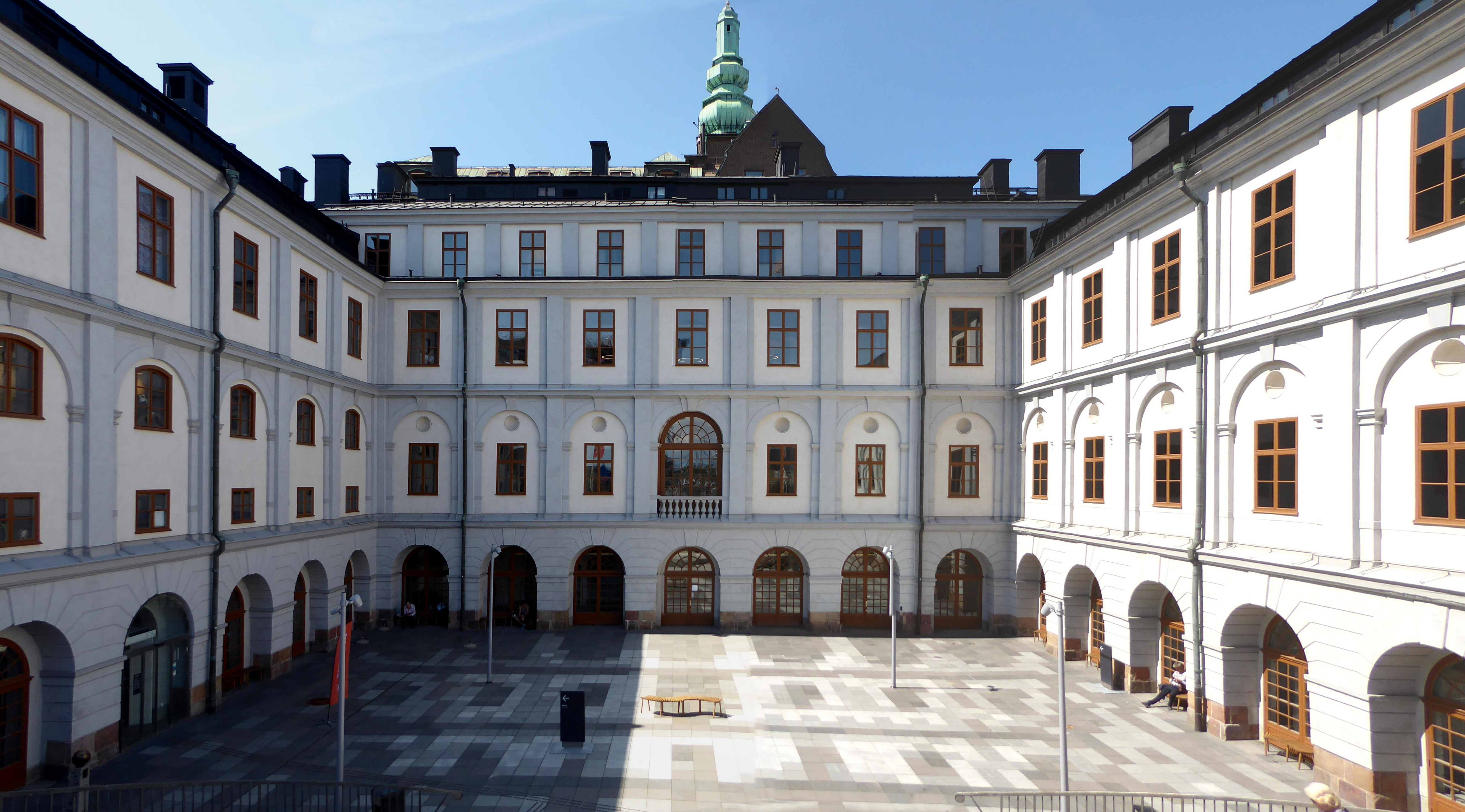 Stadsmuseet i Stockholm, innergården